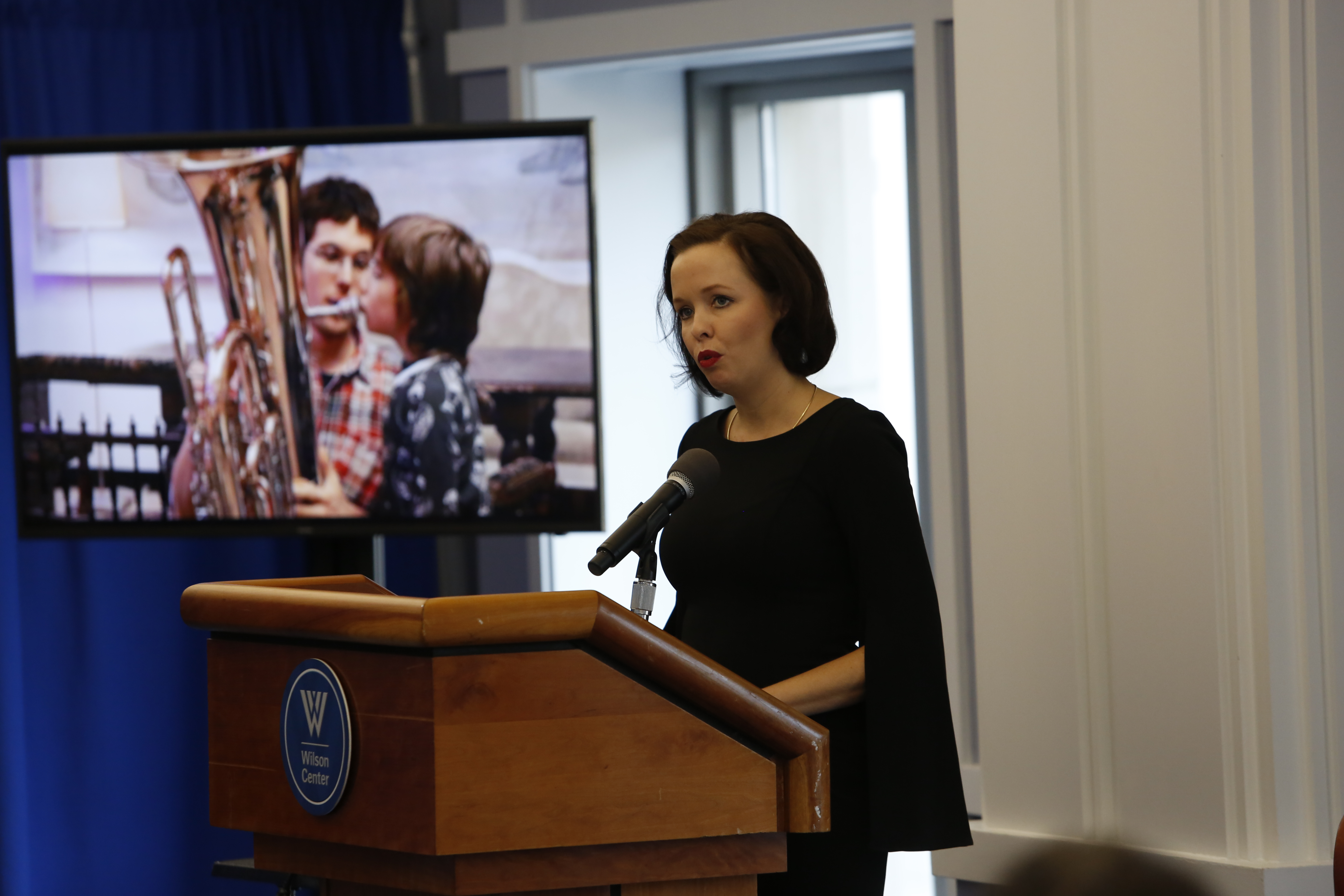 Emilie Gardberg luennoi Wilson Centerissä Washington DC:ssä 24.1.2018. Taustalla Turun filharmonisen orkesterin muusikko Nicolas Indermühle esittelemässä tuubaa.